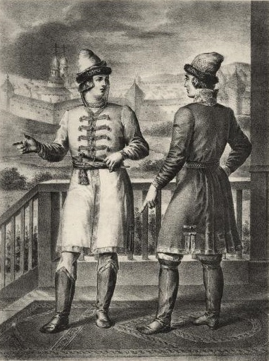 Русская одежда в XIV до XVIII столетия: кафтан и шапка. (Вид изображает город Торжок, в начале XVII столетия).